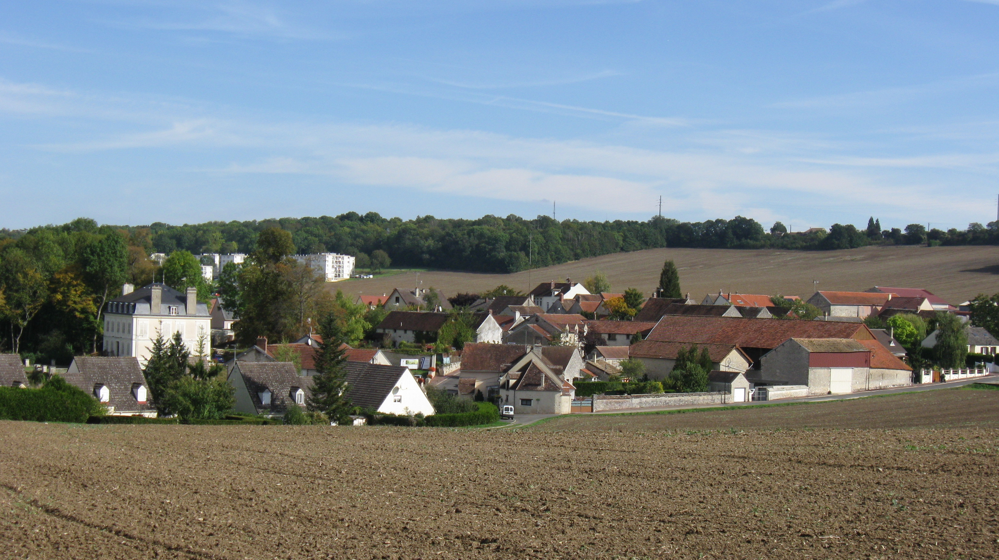 Village de Poigny (Seine-et-Marne, Île-de-France, France).